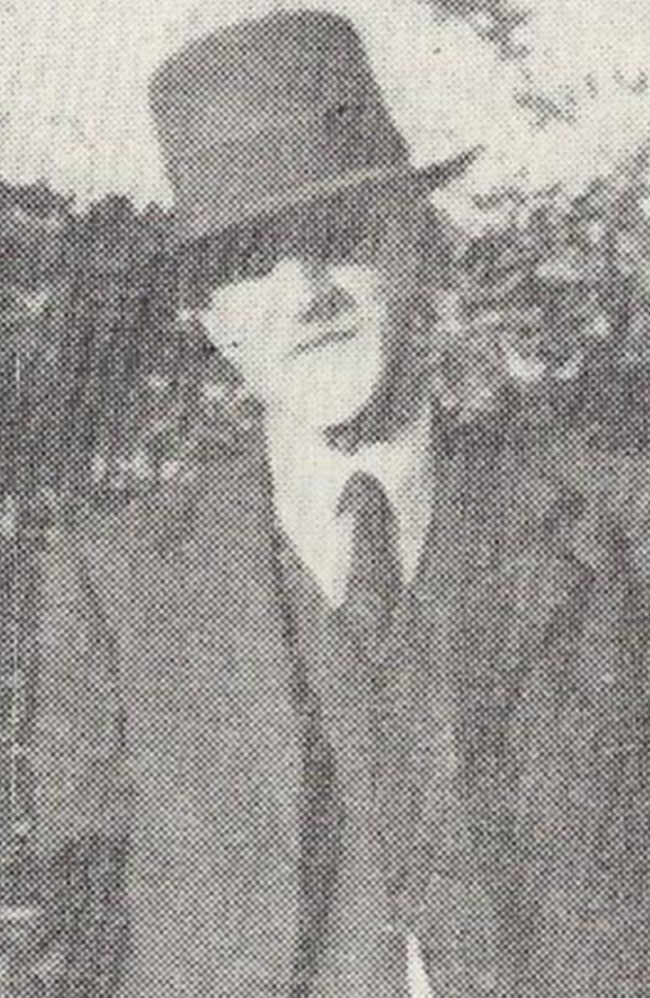 J.G Engela